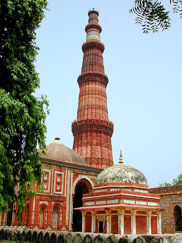 Qutab Minar in Delhi, India